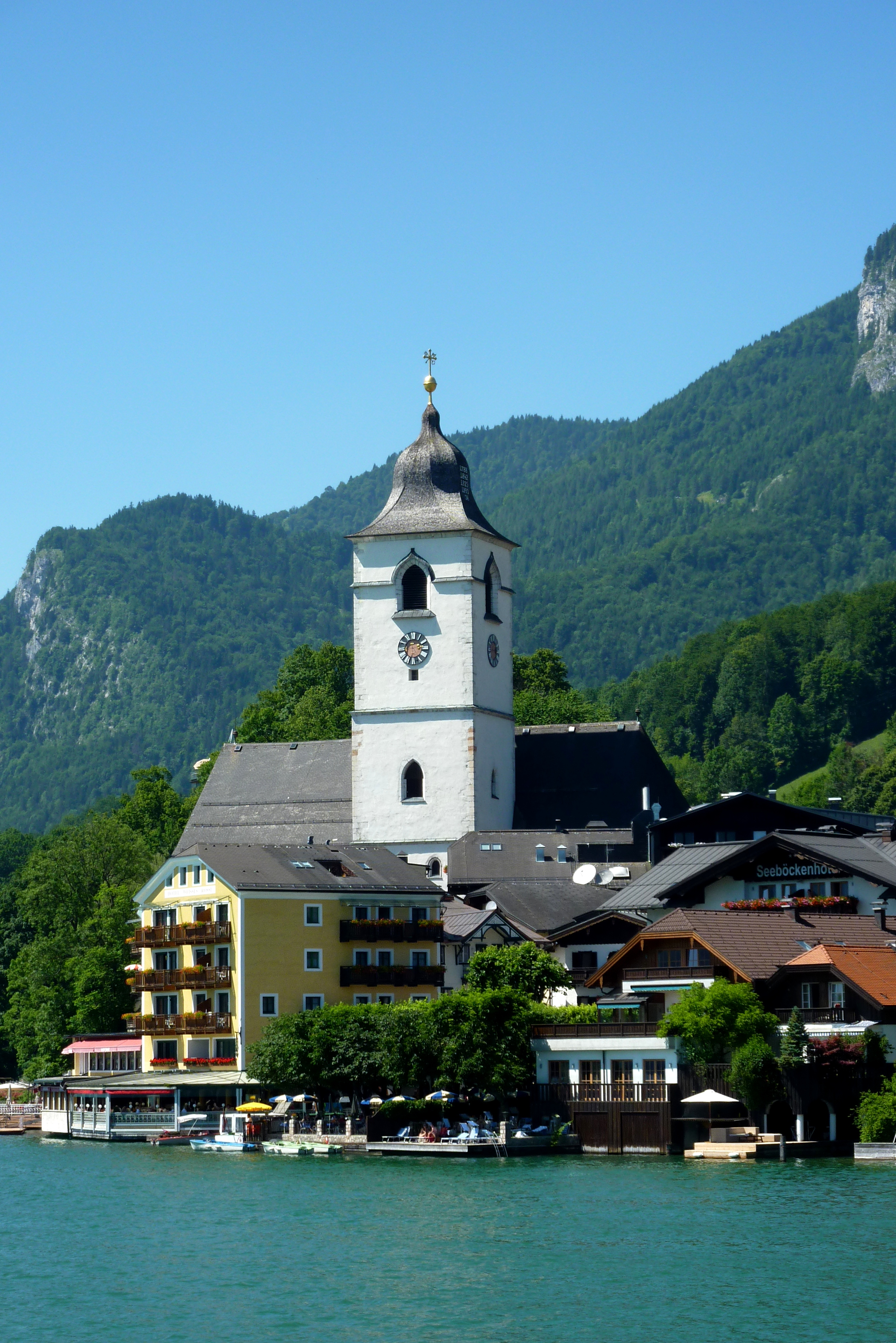 Sankt Wolfgang am Wolfgangsee, Wallfahrtskirche